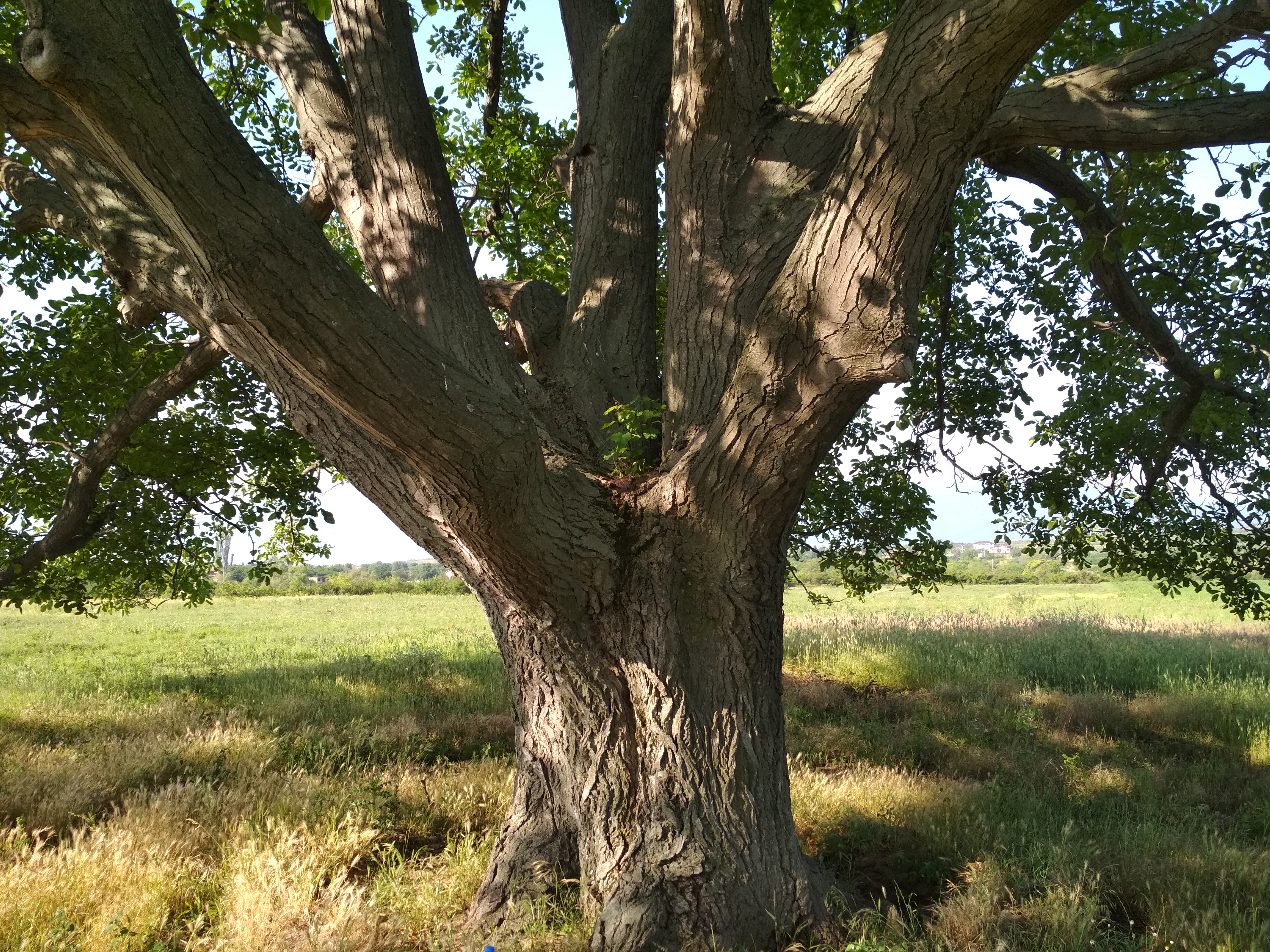 Обикновен орех на 200г.